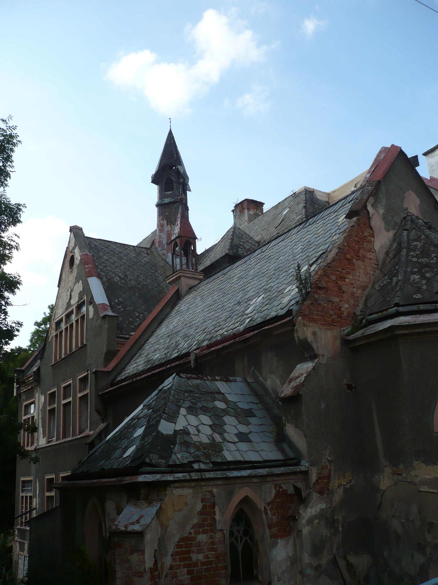 Nowa Ruda. ul. Marszałka Józefa Piłsudskiego 16 - szpital miejski, 1879, 1908, 1912